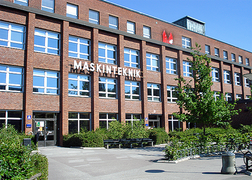 Maskinteknik, Lunds Tekniska Högskola, 2010